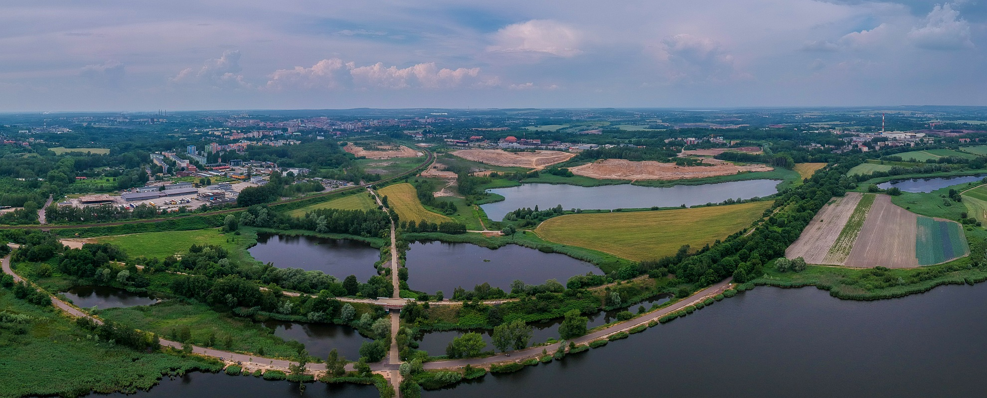 Bytom, Zespół przyrodniczo-krajobrazowy Żabie Doły na granicy Bytomia i Chorzowa